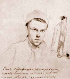 Русский художник Василий Штернберг